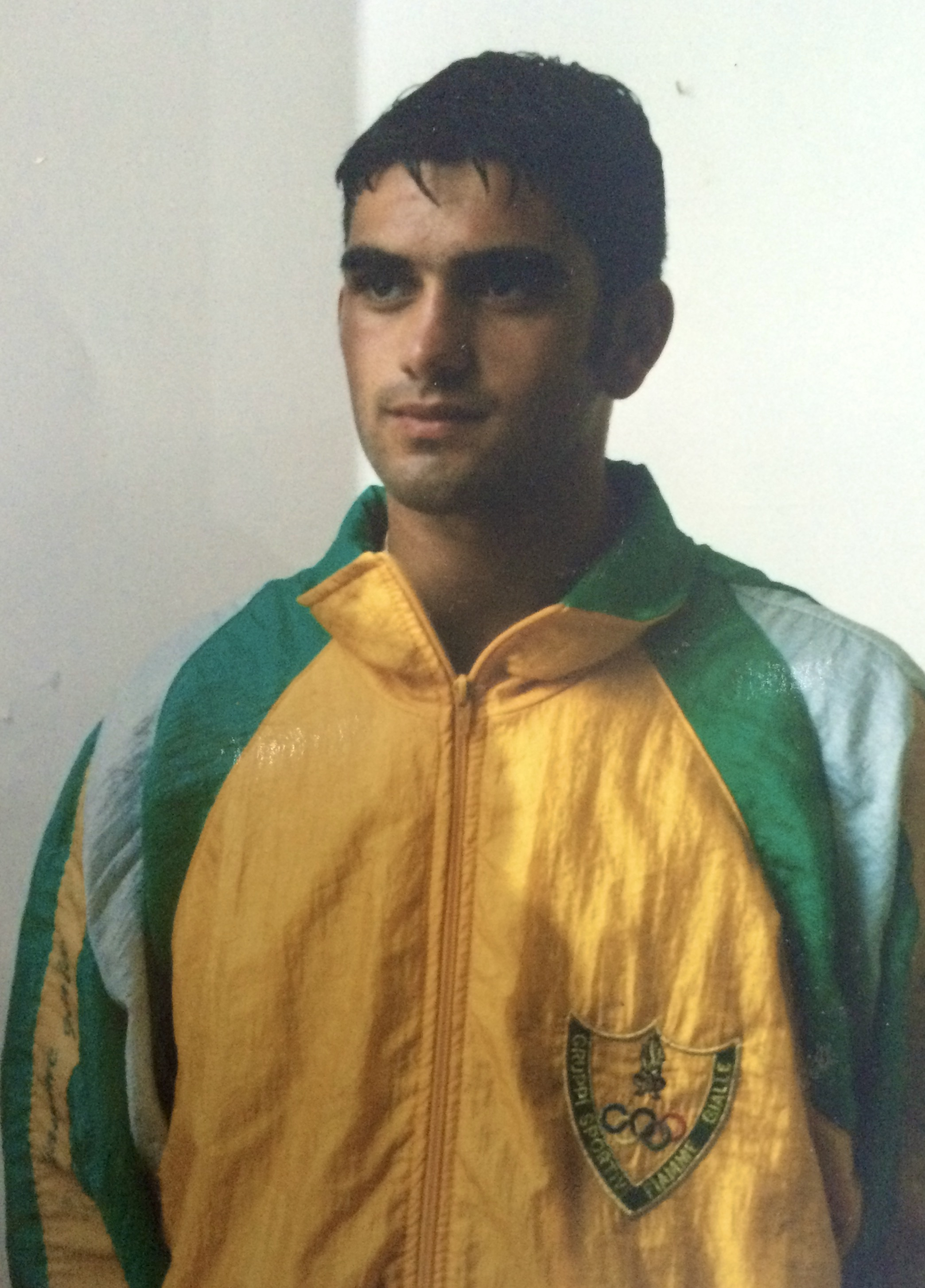 fiamme gialle